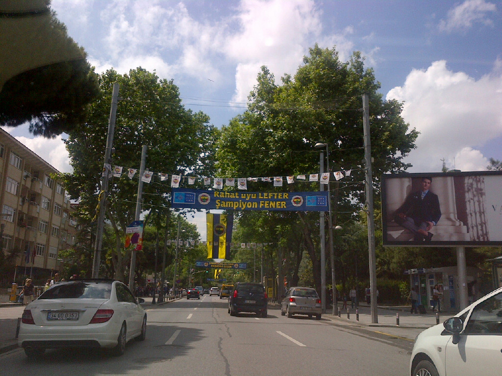 Divisas de "Rahat uyu Lefter, şampiyon Fener" (Sleep in peace Lefter, the champion is Fener) at Av. Bağdat, Istanbul, summer of 2014.